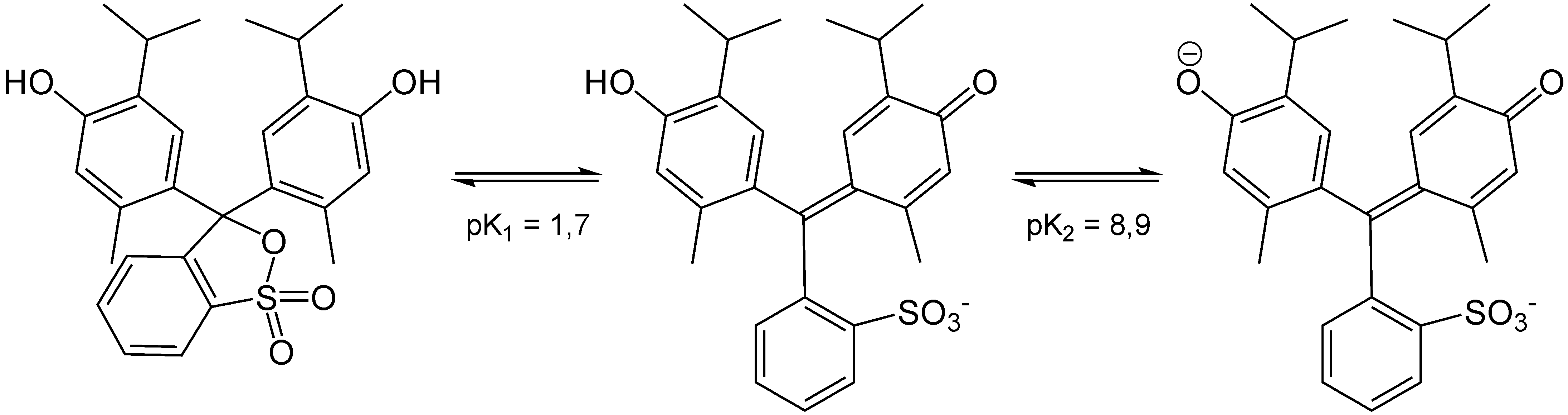 Thymolblau